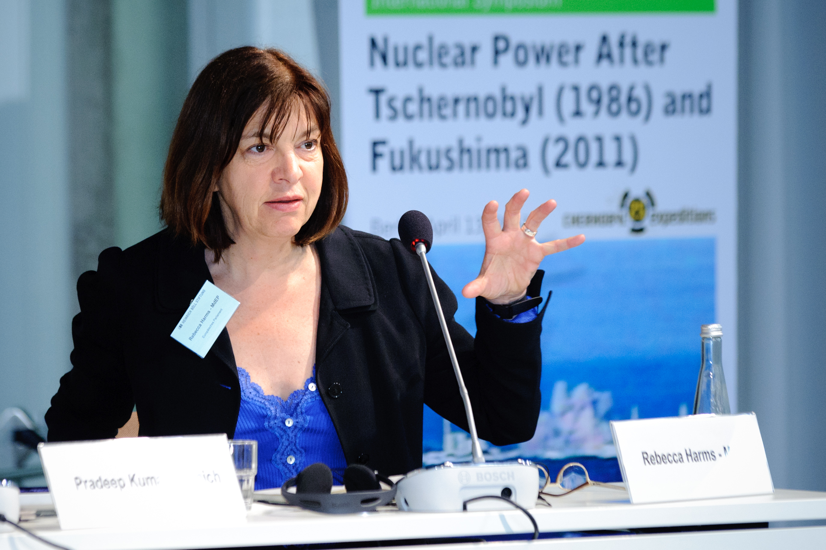 Rebecca Harms, MdEP Die Grünen/EFA Foto: Stephan Röhl